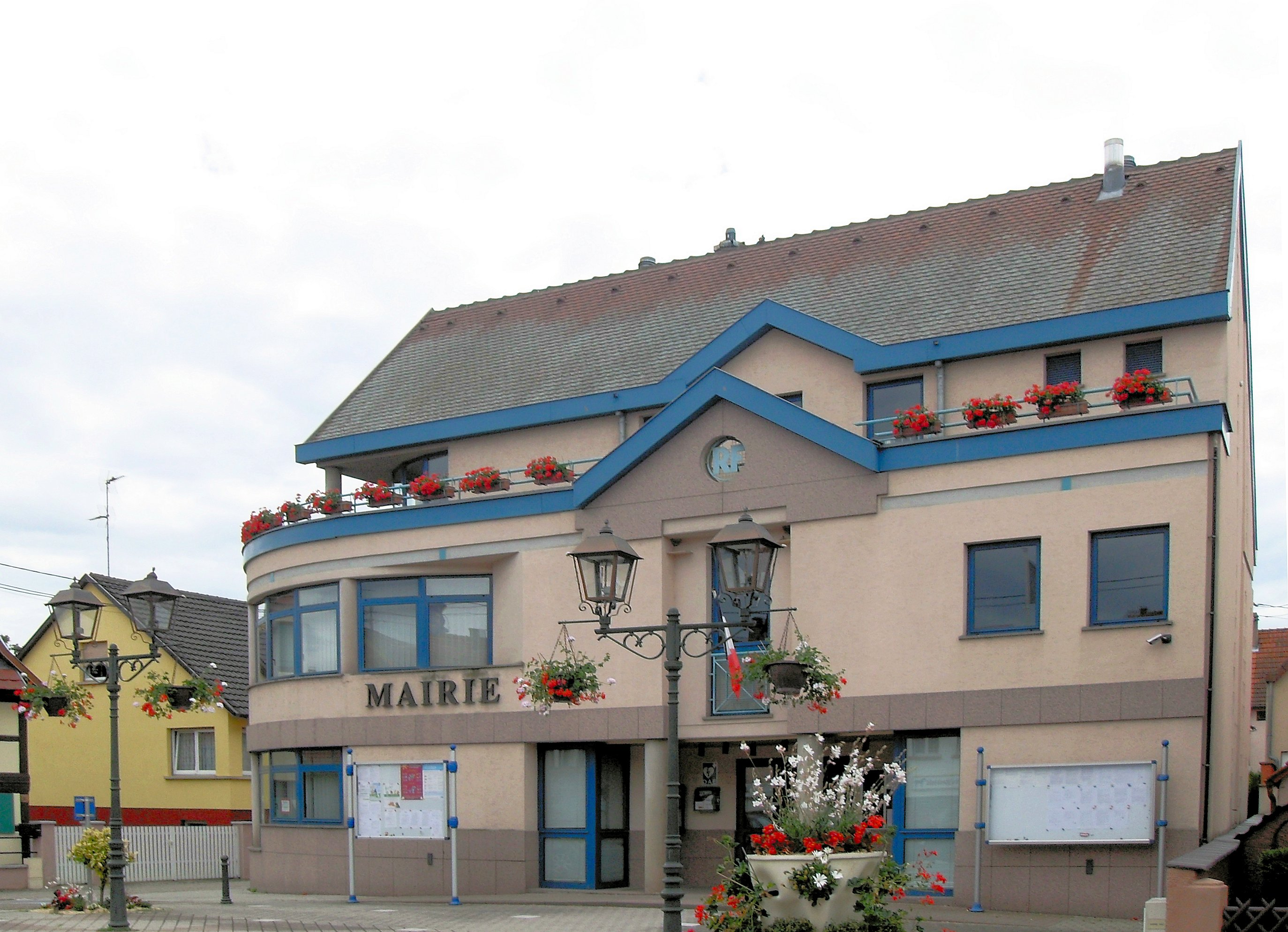 La mairie d'Achenheim